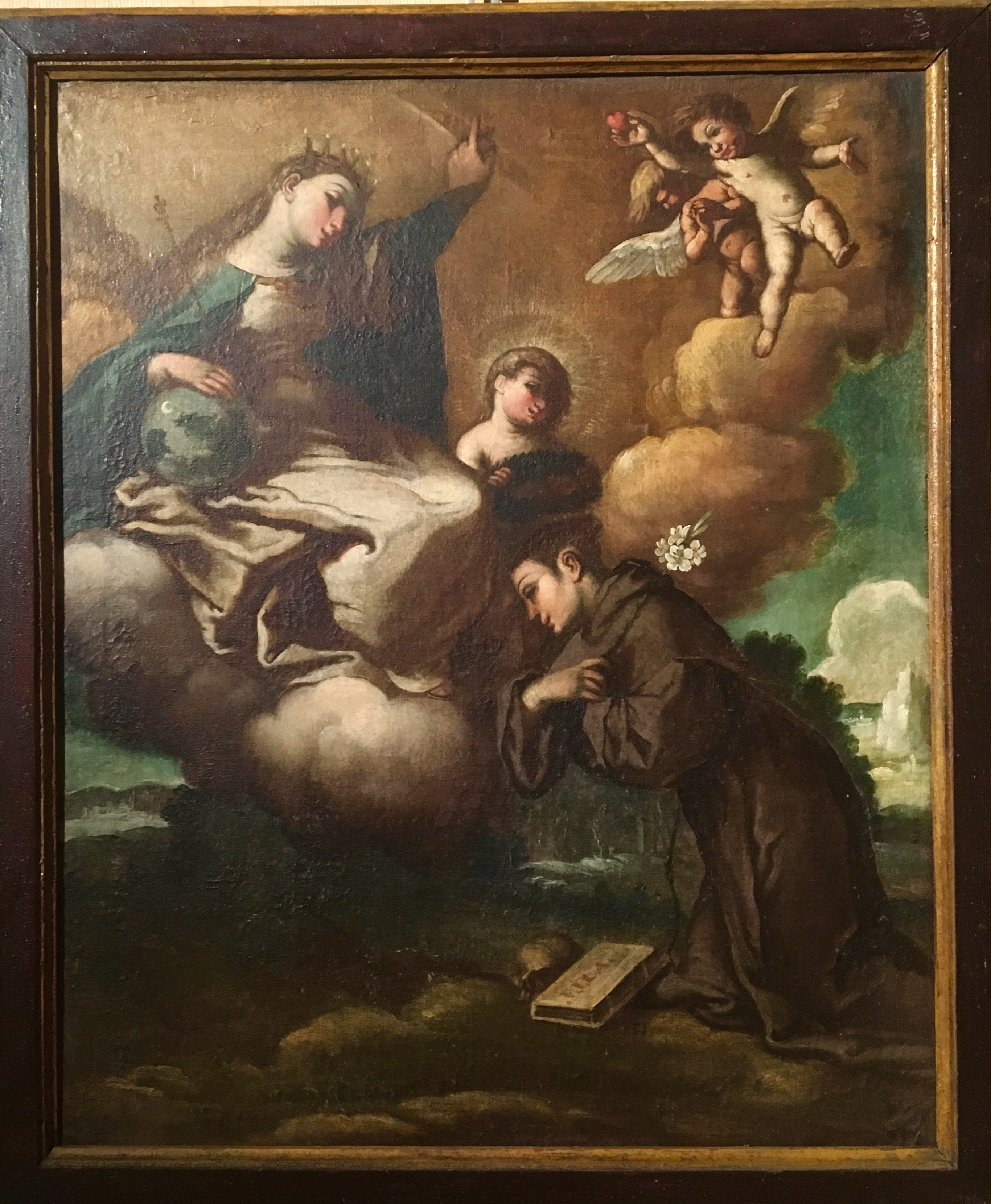 Nasini2